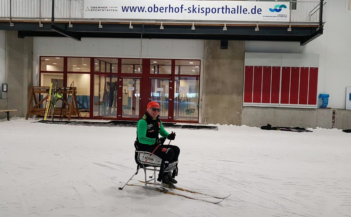 Para Ski nordisch für Menschen mit Behinderung im Langlaufschlitten in der Skihalle Oberhof